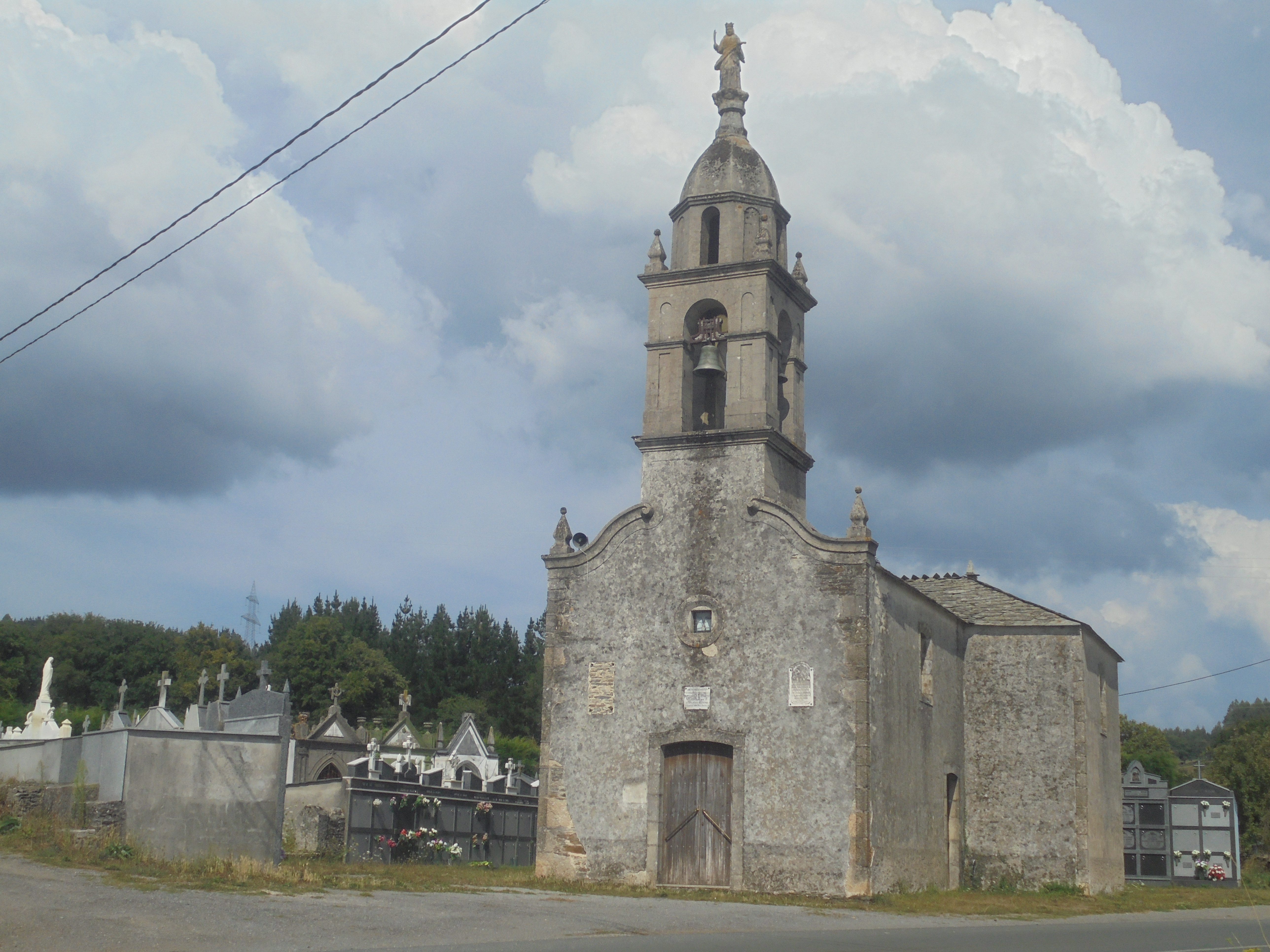 Igrexa parroquial de Suegos ( Pol )